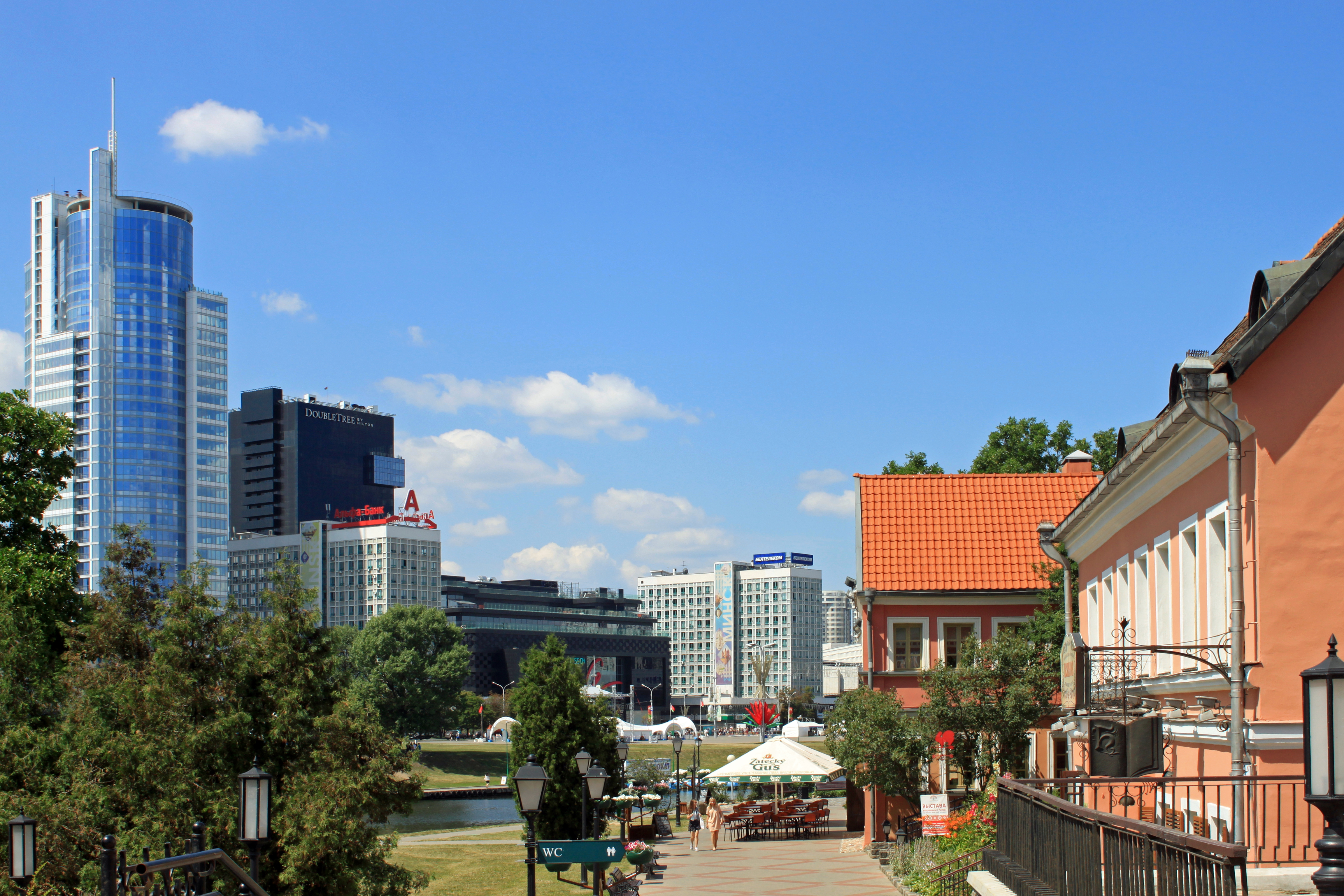 Минск, Центральный район, Троицкое предместье с видом на проспект Победителей, 30 июня 2016 года